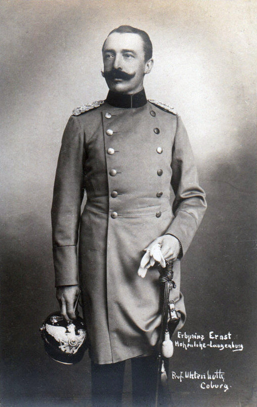 Erbprinz Ernst zu Hohenlohe Langenburg